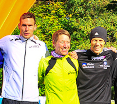 6. CROSSTOCK TEAMCROSS, Sebastian Rank, Christiane Pilz, Steffen Uliczka.